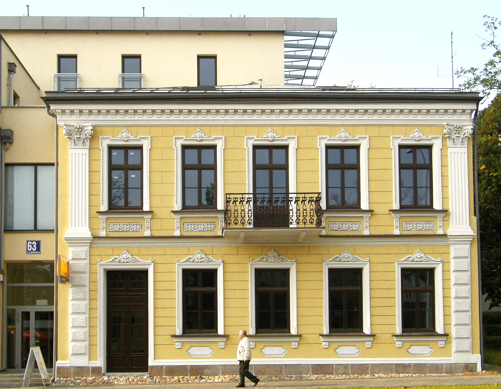 Białystok, ul. Sienkiewicza 63A - kamienica (zabytek nr A-223 z 23.04.1998)